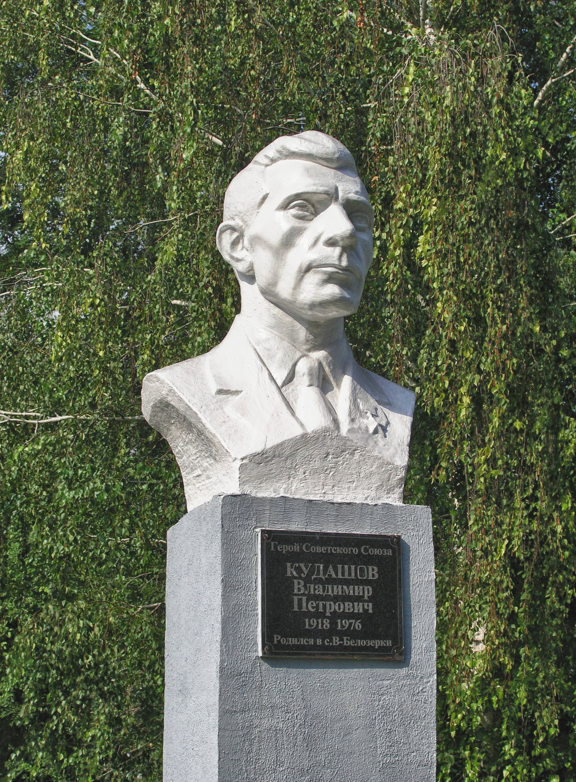 Бюст Герою Советского Союза Владимиру Кудашову, Верхние Белозёрки, Ставропольский район, Самарская область, Россия